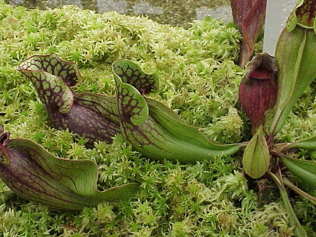 Species: Sarracenia purpurea Family: Sarraceniaceae Image No. 2